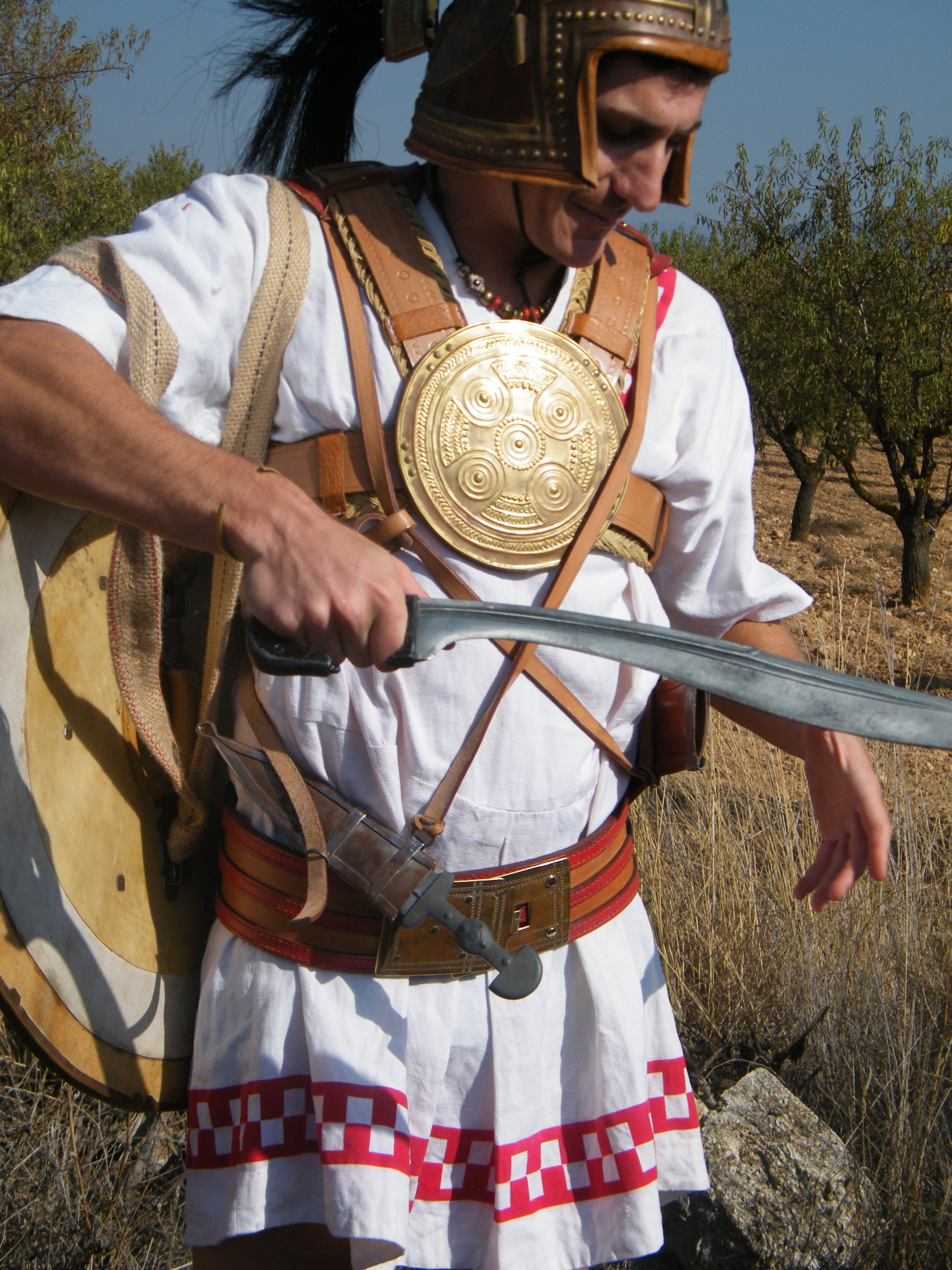 Recreación de guerrero ibero del siglo III a. C., con sus armas (falcata, escudo, peto de placa, linotórax). VII Jornada de puertas abiertas del recinto arqueológico de Kelin. Paraje los Villares, Caudete de las Fuentes, Valencia.